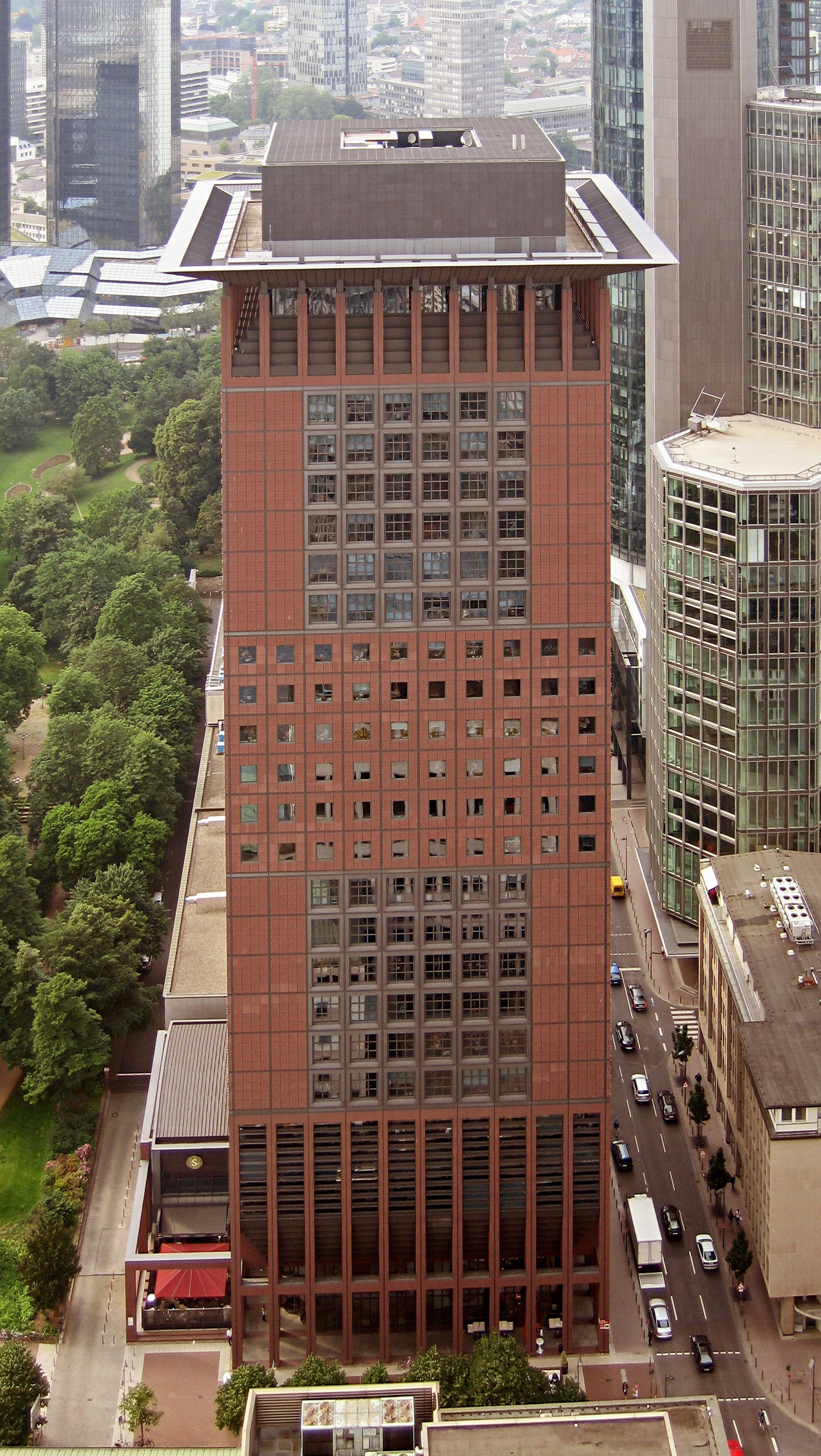 Japan Tower, Frankfurt am Main, vom Dach der EZB